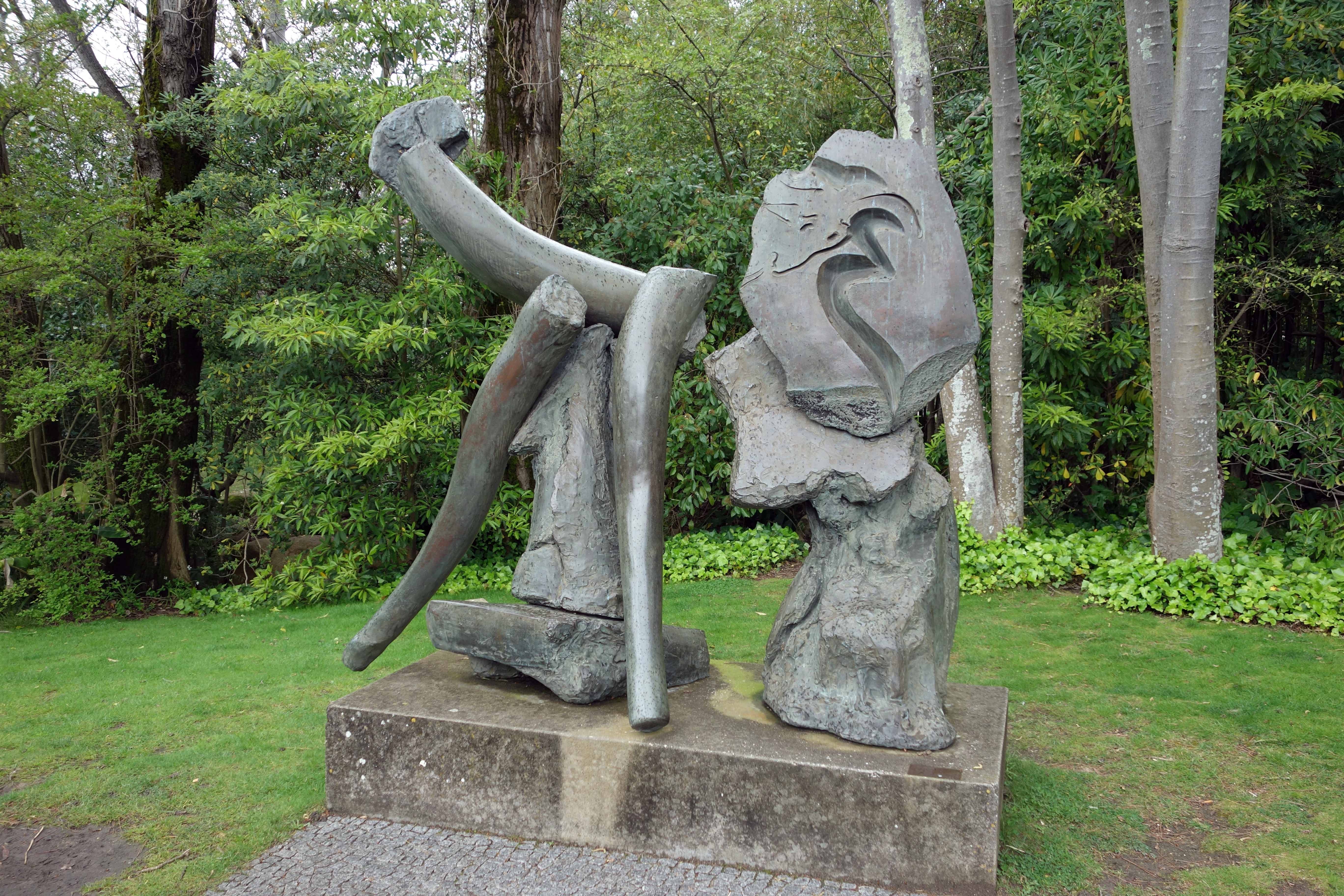 Lisbon